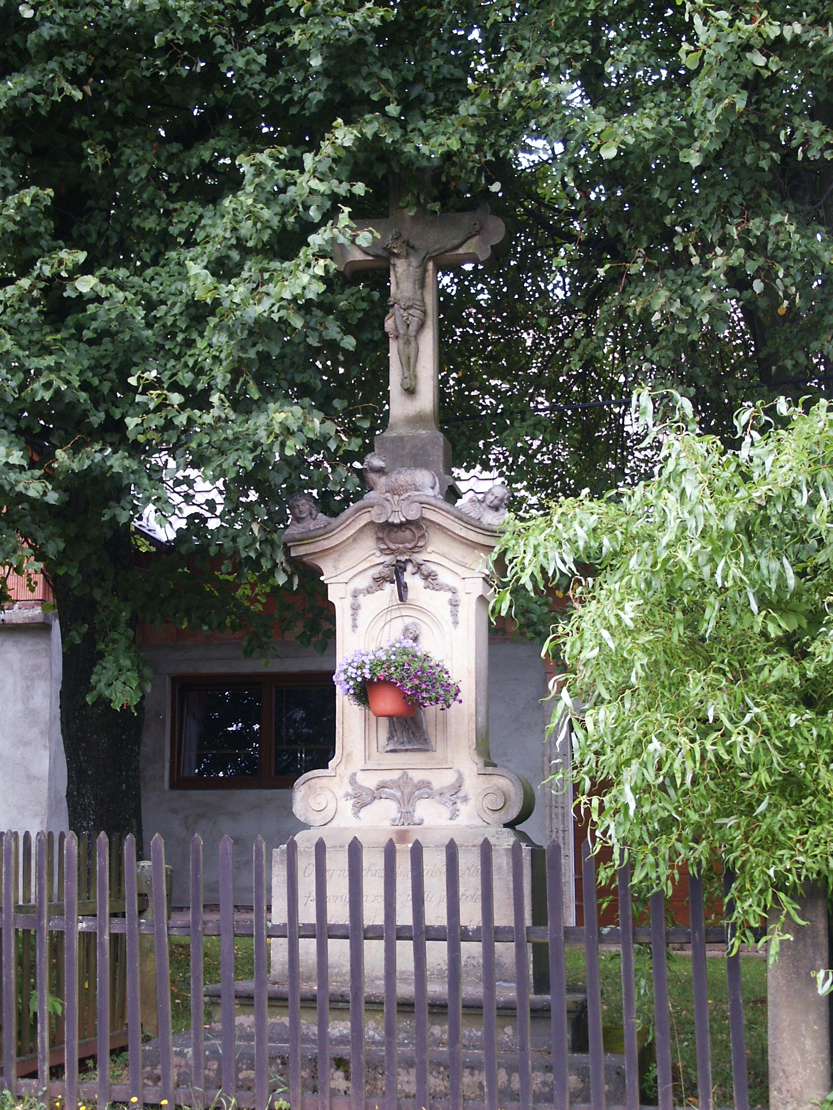 Heřmanice - kříž u č.p. 55